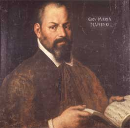 Italian composer Giovanni Maria Nanino (1544-1607)